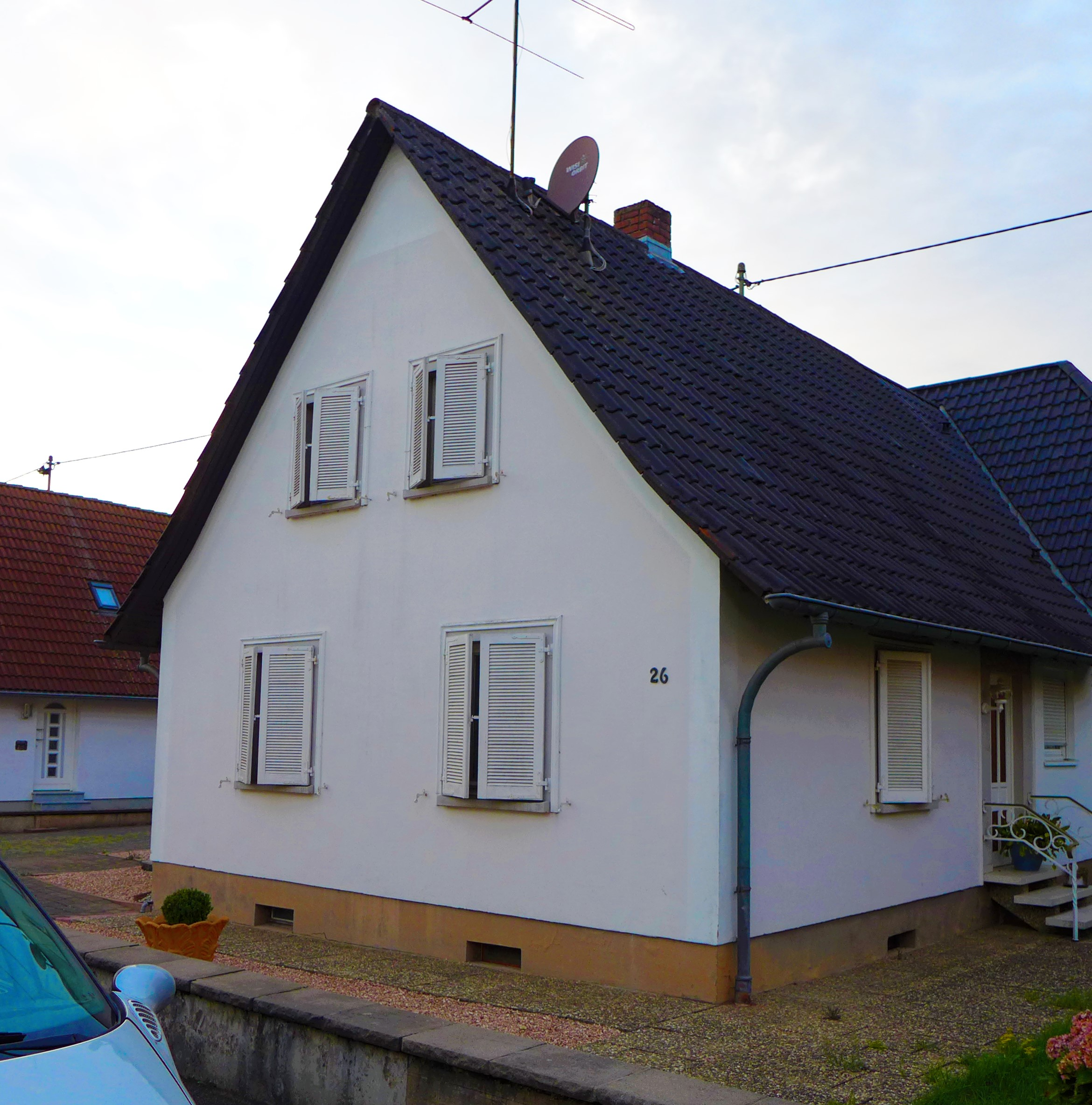 Diefflen, Siedlungshaus des NS-Siedlungsbauprogrammes